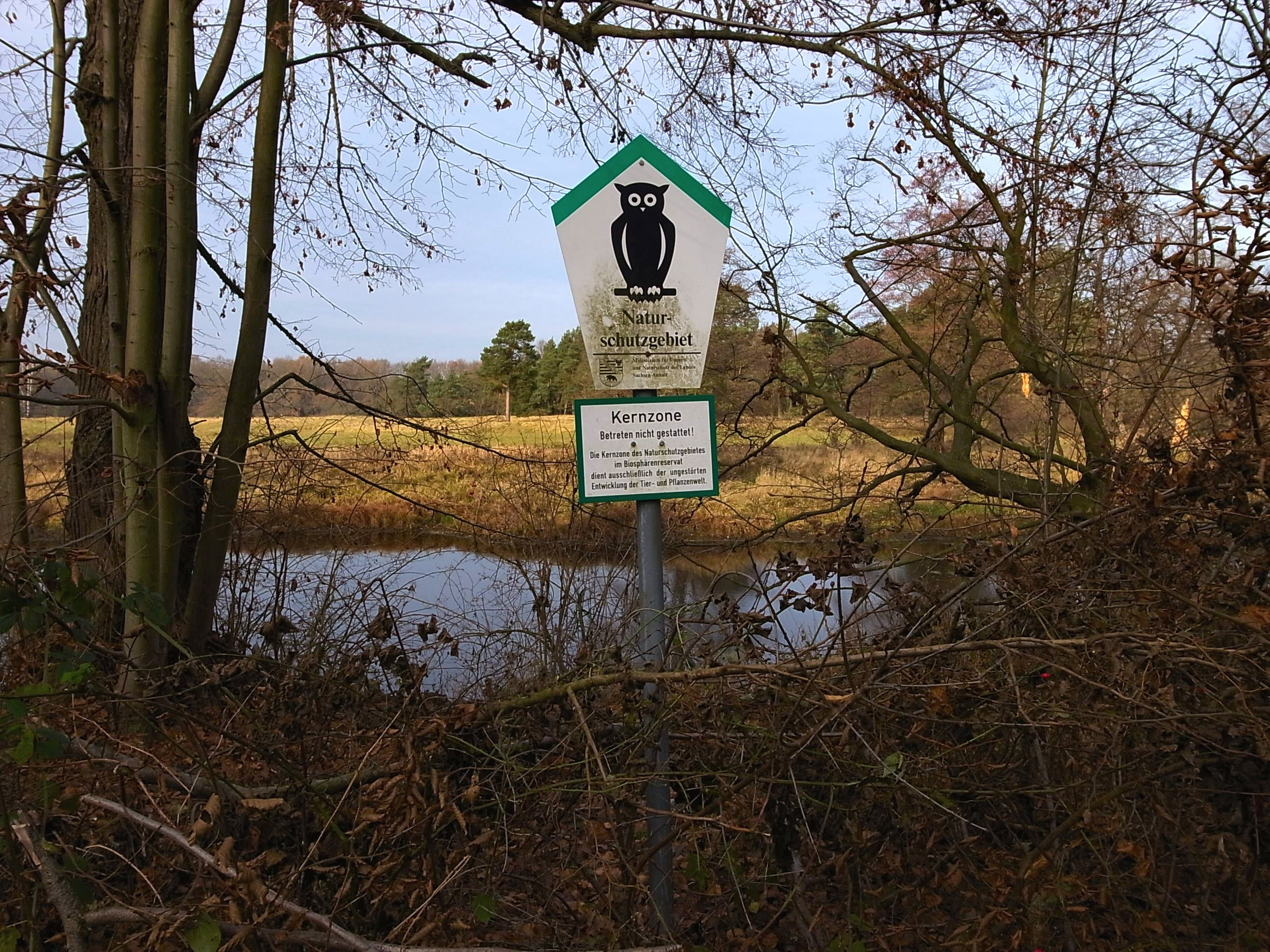 Biosphärenreservat Mittelelbe, Hinweisschild Kernzone NSG "Untere Mulde" (NSG 120) am Mulde-Altwasser "Peissers Werder"